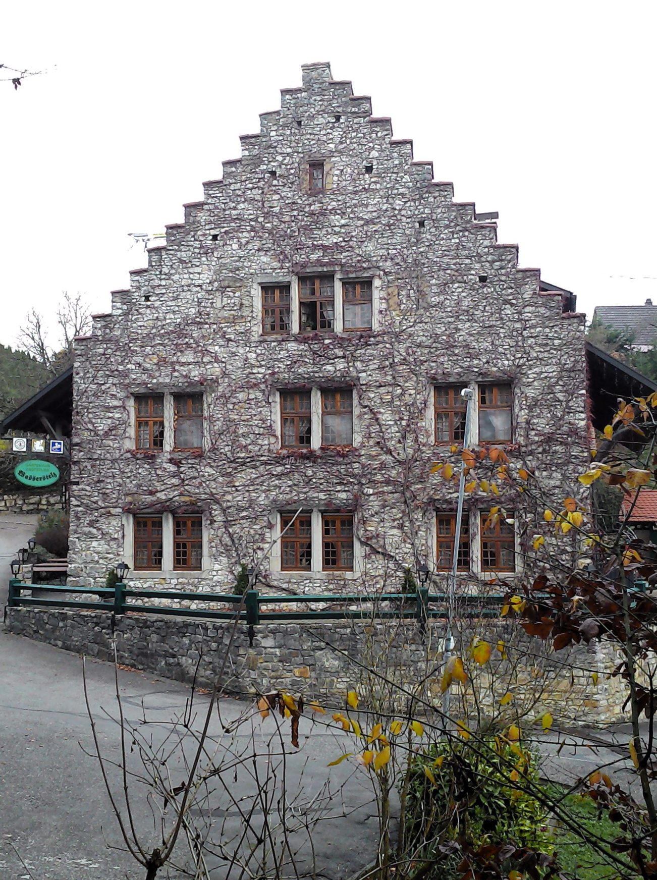 Ehemaliger Wirtschaftshof und Zehntscheuer des Gehöft Guggenmühle und heutiges Hotel Wasserstelz nahe der Burgruine Weisswasserstelz, Hohentengen am Hochrhein, Landkreis Waldshut, Baden-Württemberg.